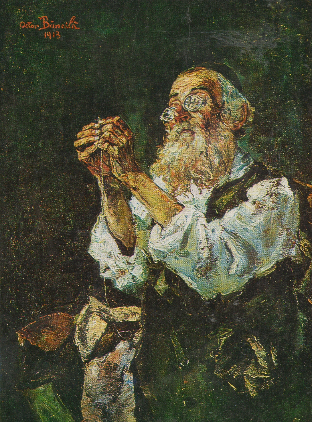 Croitor batran